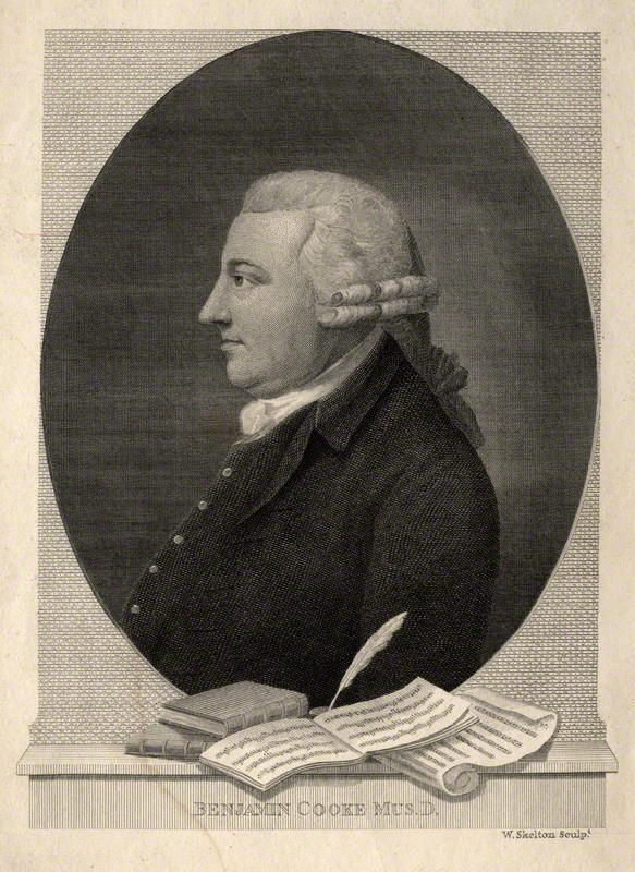 Depicted person: Benjamin Cooke